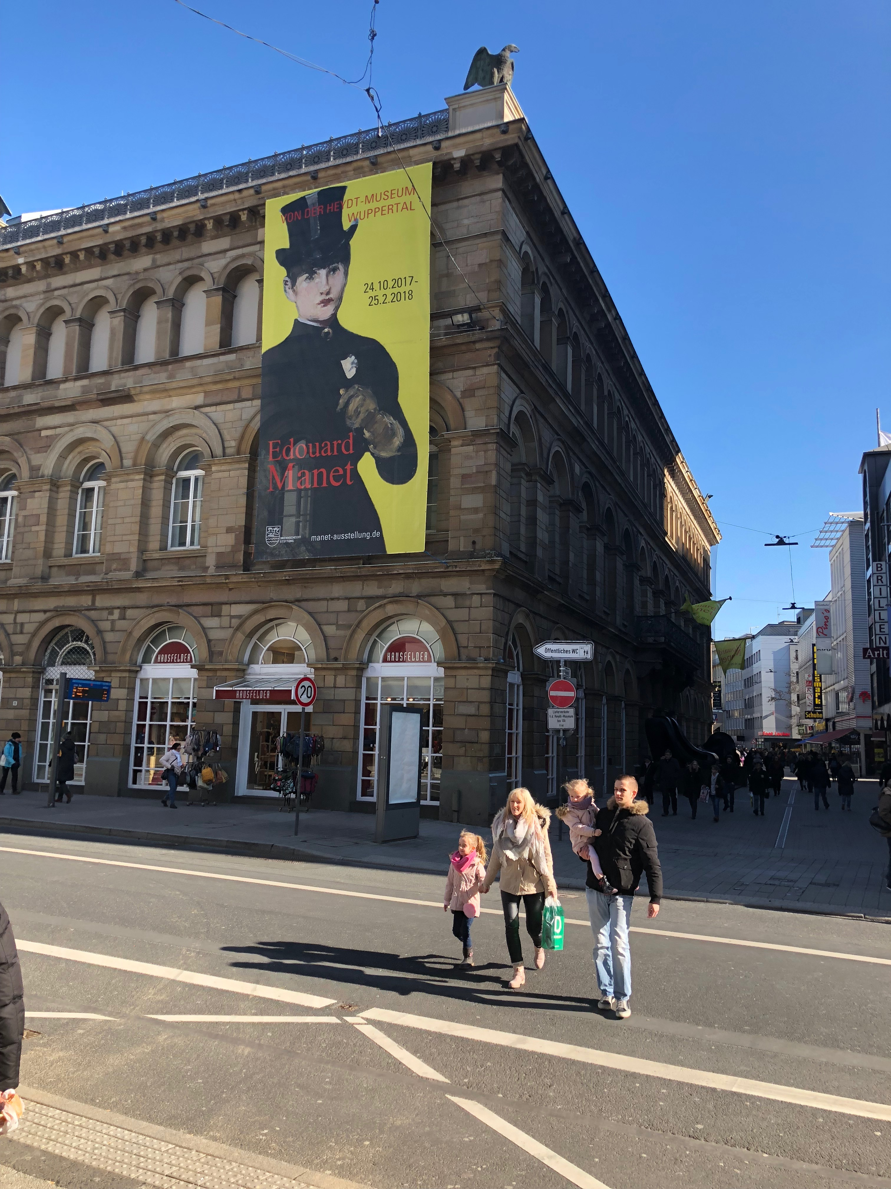 Wall, Wuppertal